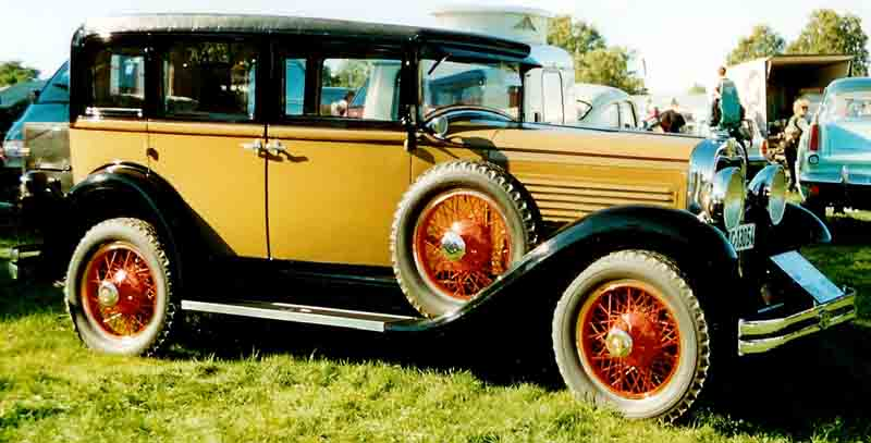 Roosevelt 4-Door Sedan 1929